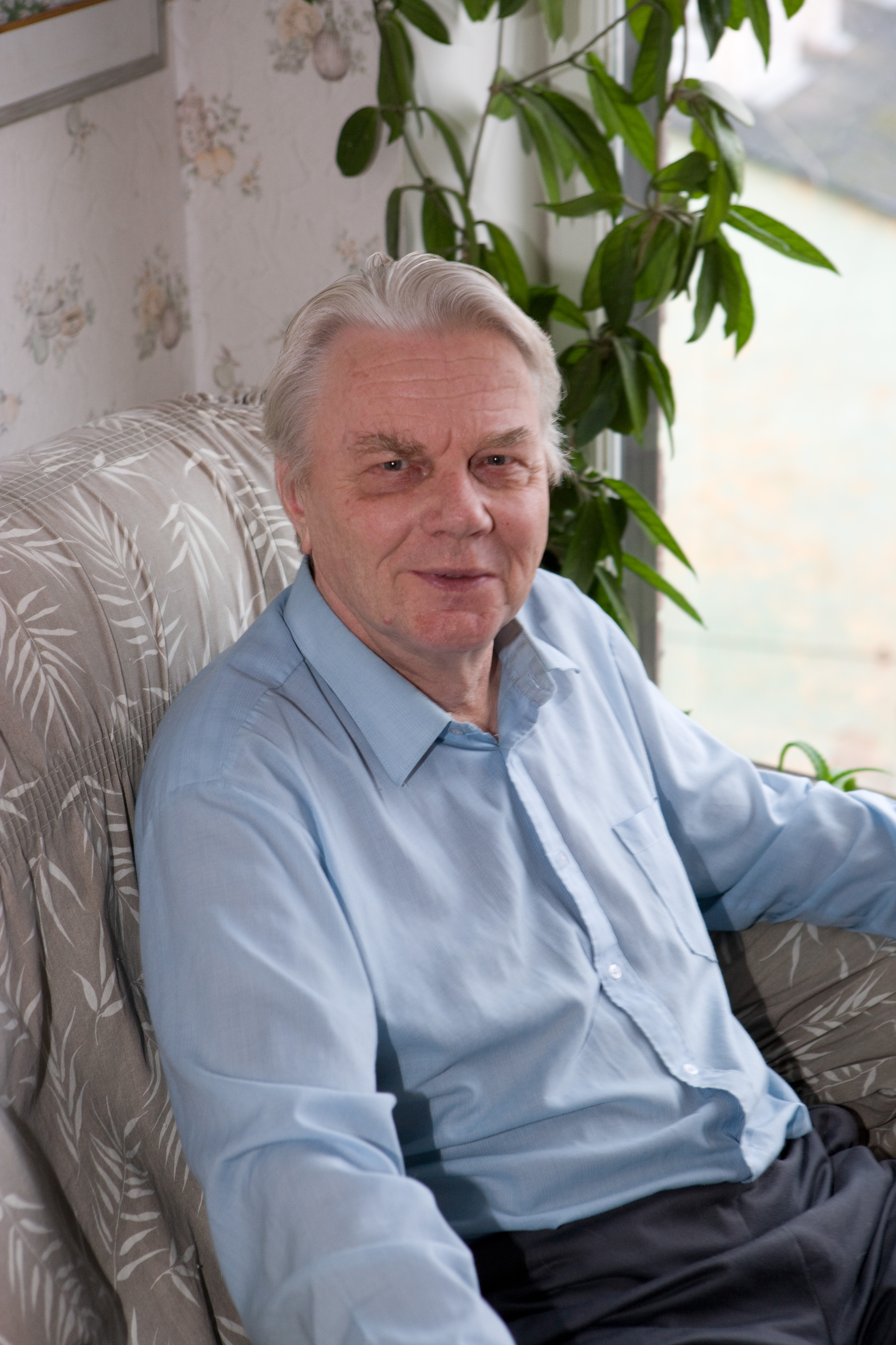 Tartu Ülikooli teadusfilosoofia professor Rein Vihalemm.